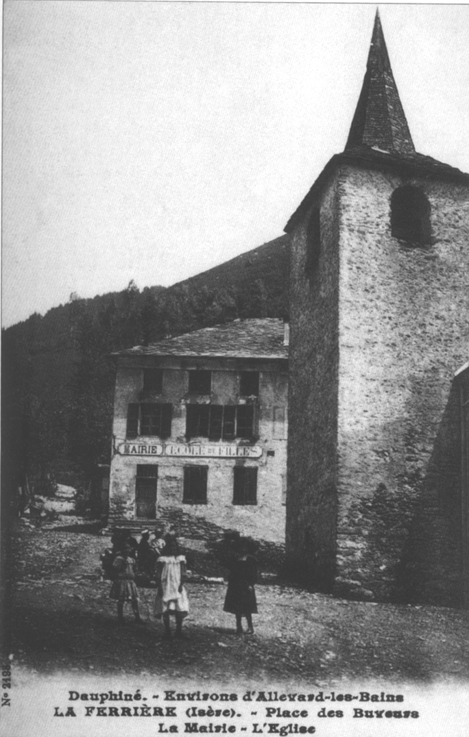 La Ferrière, place des buveurs, la mairie, l'église.